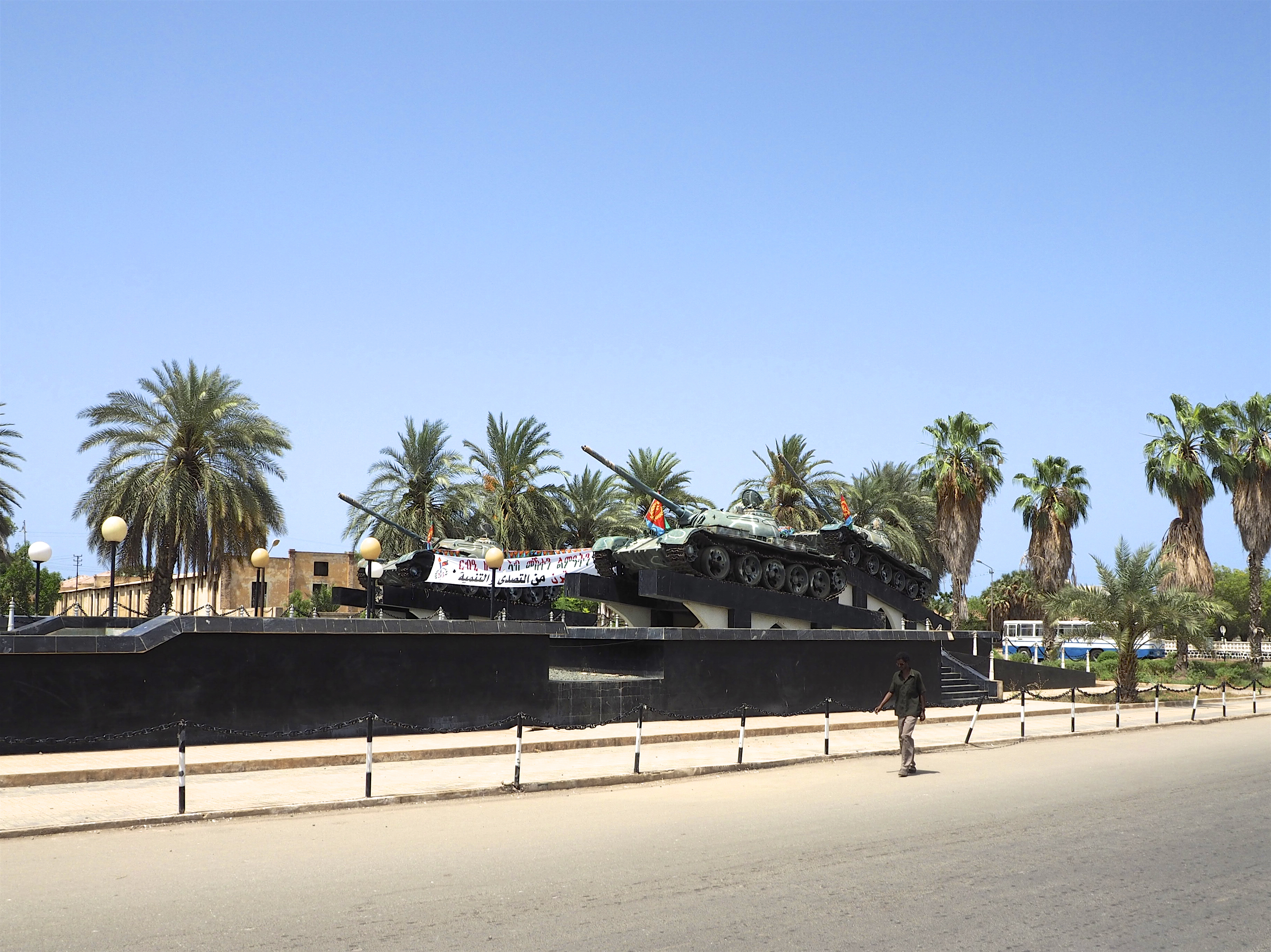 Massawa , Eritrea